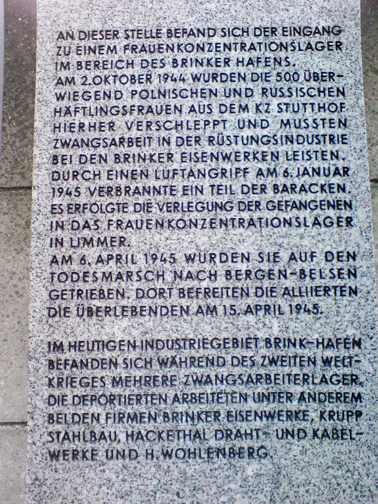 Das Mahnmal gedenkt den Zwangsarbeiterinnen der Rüstungs- und Kriegsproduktion in den Brinker Eisenwerken und benachbarten Lägern der Firmen in der Umgebung, die hier vom 02.10.1944 bis Januar 1945 unterbracht waren. Inschrift: An dieser Stelle befand sich der Eingang zu einem Frauenkonzentrationslager im Bereich des Brinker Hafens. Am 2. Oktober 1944 wurden die 500 überwiegend polnischen und russischen Häftlingsfrauen aus dem KZ Stutthof hierher verschleppt und mussten Zwangsarbeit in der Rüstungsindustrie bei den Brinker Eisenwerken leisten. Durch einen Luftangriff am 6. Januar 1945 verbrannte ein Teil der Baracken. Es erfolgte die Verlegung der Gefangenen in das Frauenkonzentrationslager in Limmer. Am 6. April 1945 wurden sie auf den Todesmarsch nach Bergen-Belsen getrieben. Dort befreiten die Alliierten die Überlebenden am 15. April 1945. Im heutigen Industriegebiet Brink-Hafen befanden sich während des Zweiten Weltkrieges mehrere Zwangsarbeiterlager. Die Deportierten arbeiteten unter anderem bei den Firmen Brinker Eisenwerke, Krupp Stahlbau, Hackethal Draht- und Kabelwerke und H. Wohlenberg. Zum Gedenken an die ermordeten Zwangsarbeiter, Gefangenen und KZ-Häftlinge